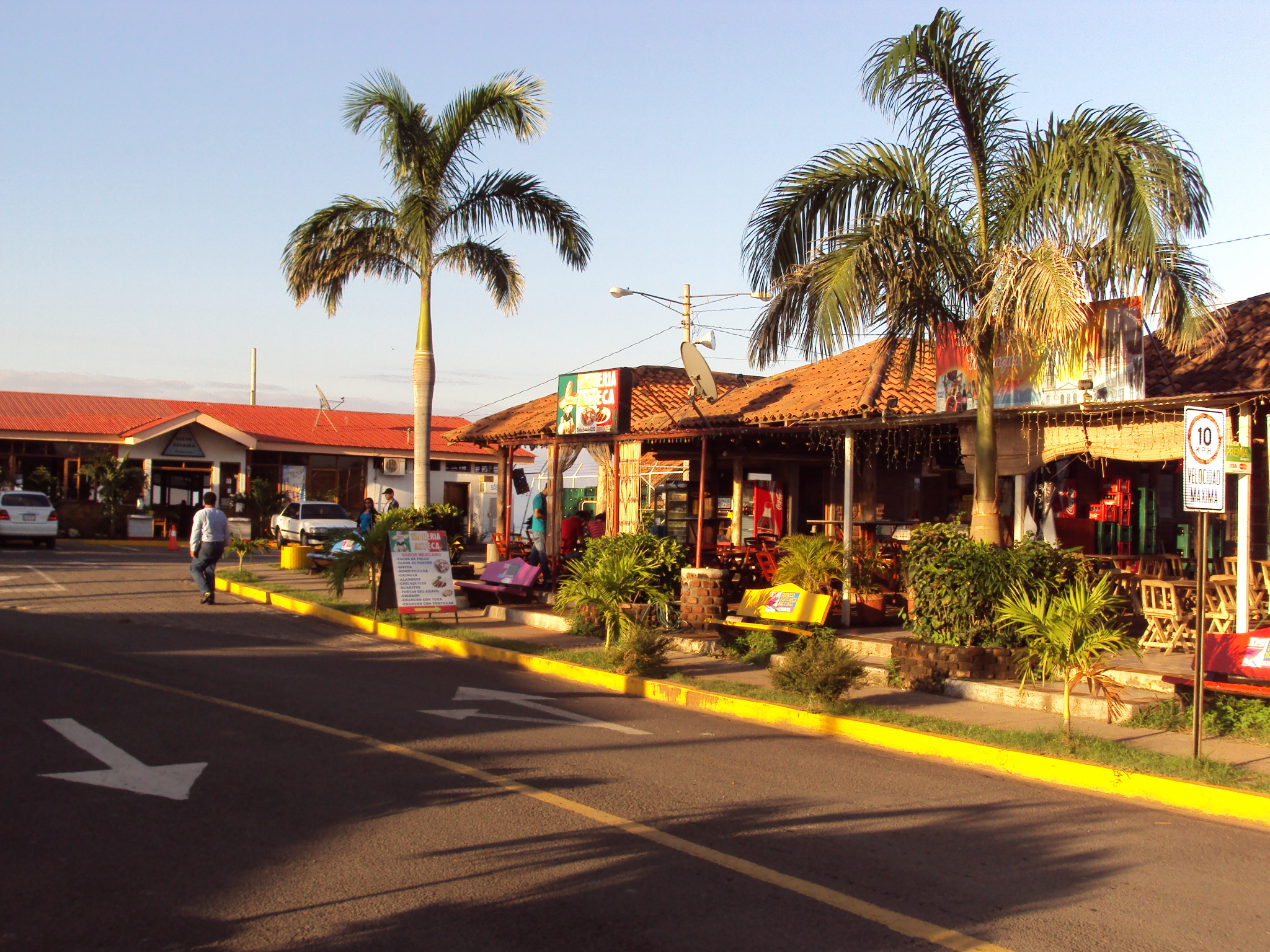 MALECON SALVADOR ALLENDE, LAGO XOLOTLAN. MANAGUA, NICARAGUA